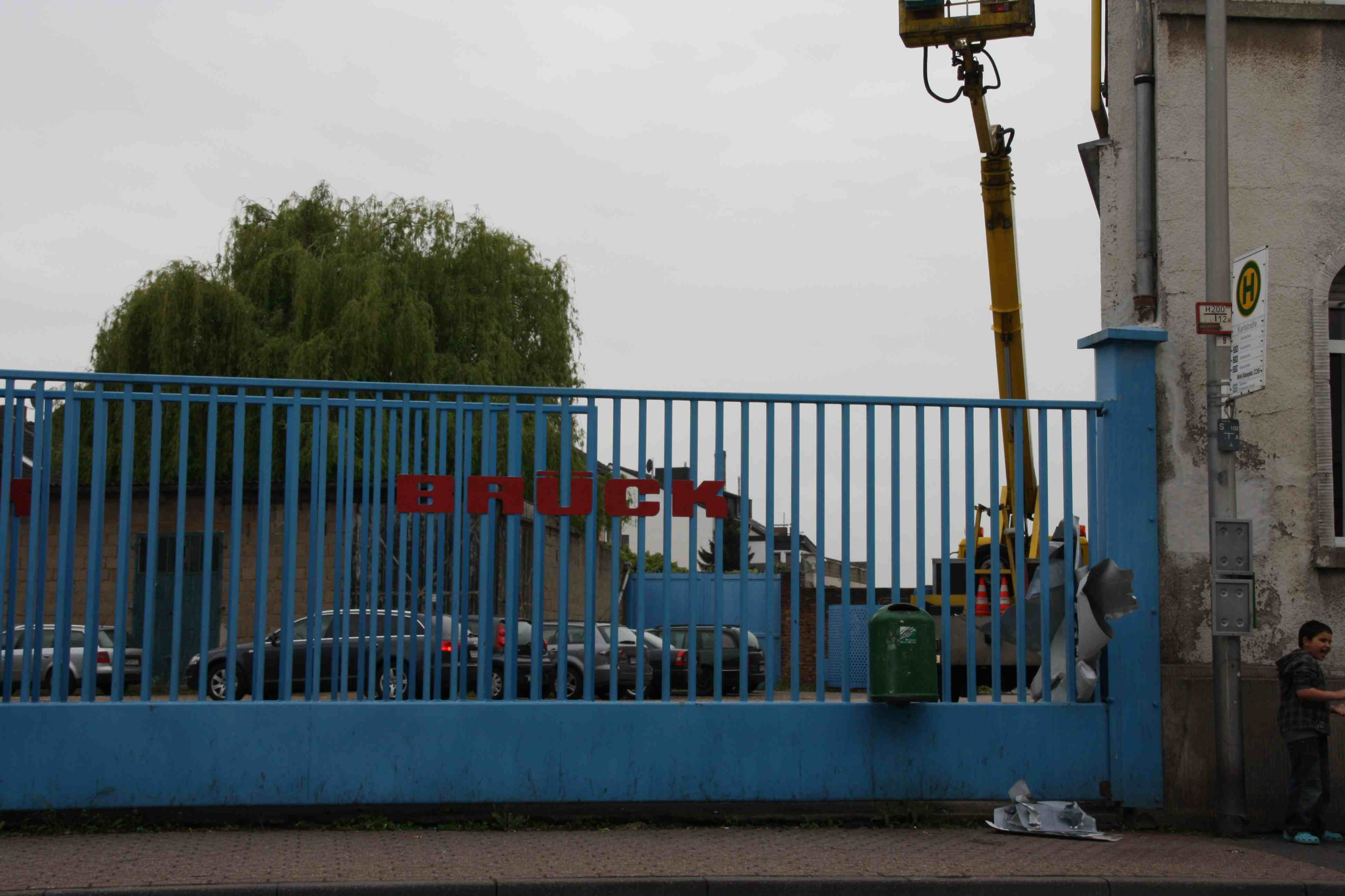 Einfahrt zhur Firma Brück in Düren mit Firmenlogo